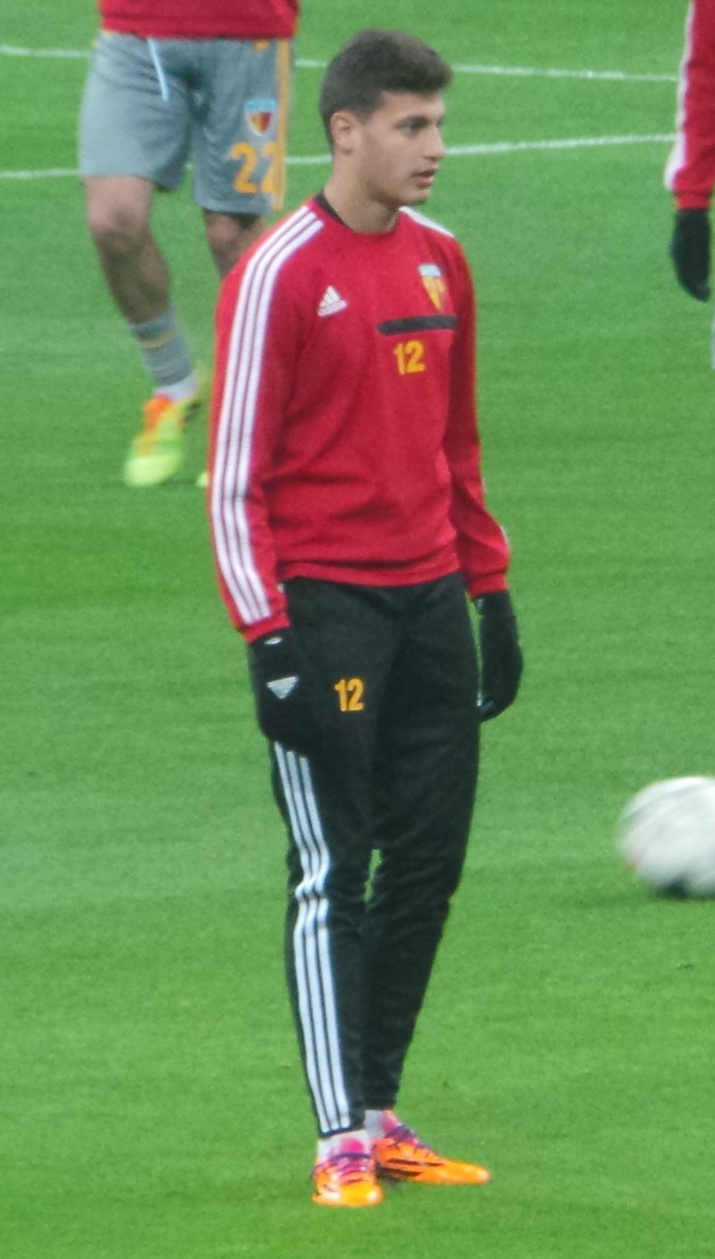 Sinan bakış